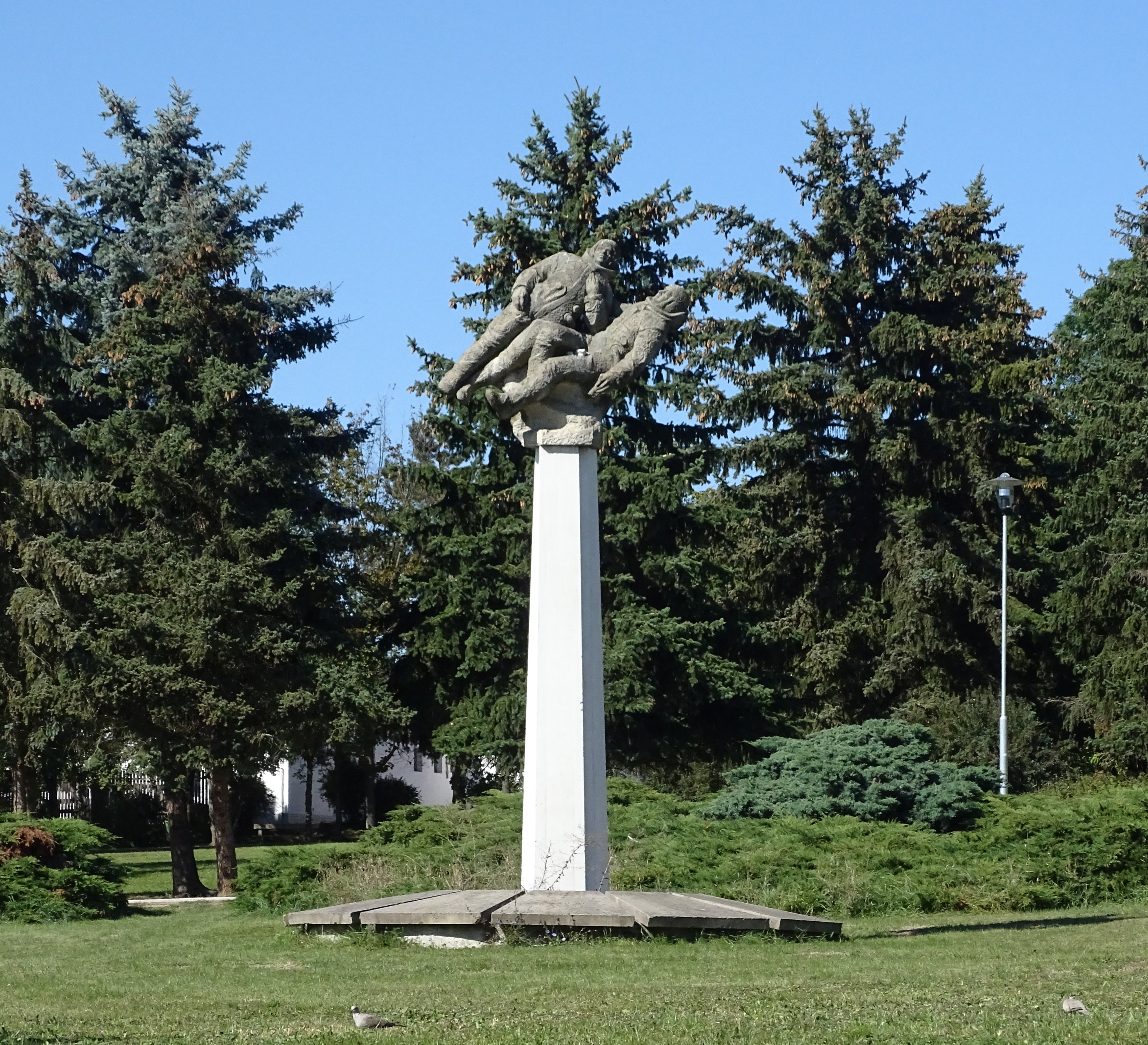 Kosmonauti, sousoší Ludvíka Kodyma a Boženy Kodymové z roku 1983. V parku mezi třídou 1. máje a ulicí U Parku, Přeštice, okr. Plzeň-jih.